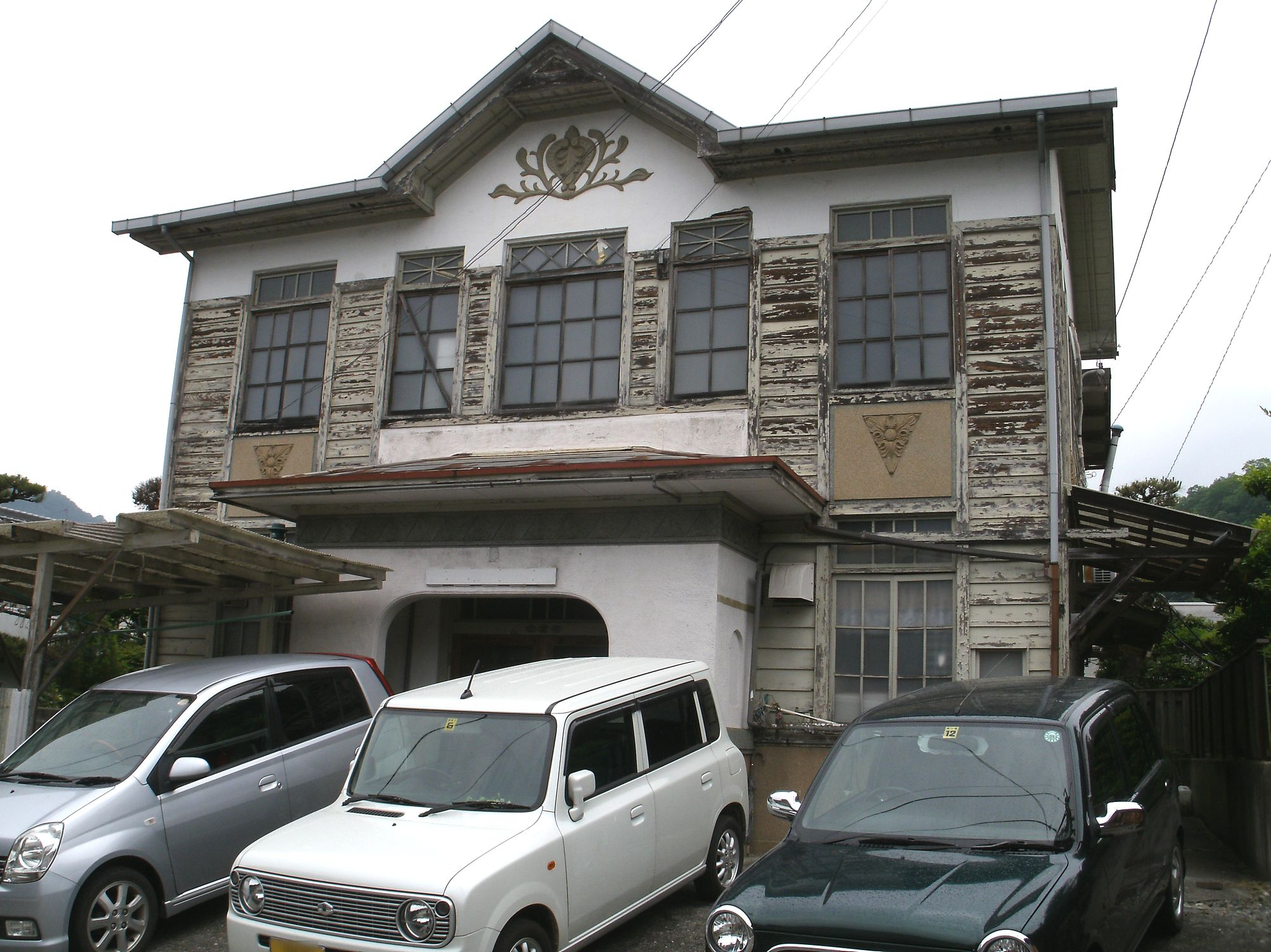 三縄郵便局 洋館造りの旧局舎